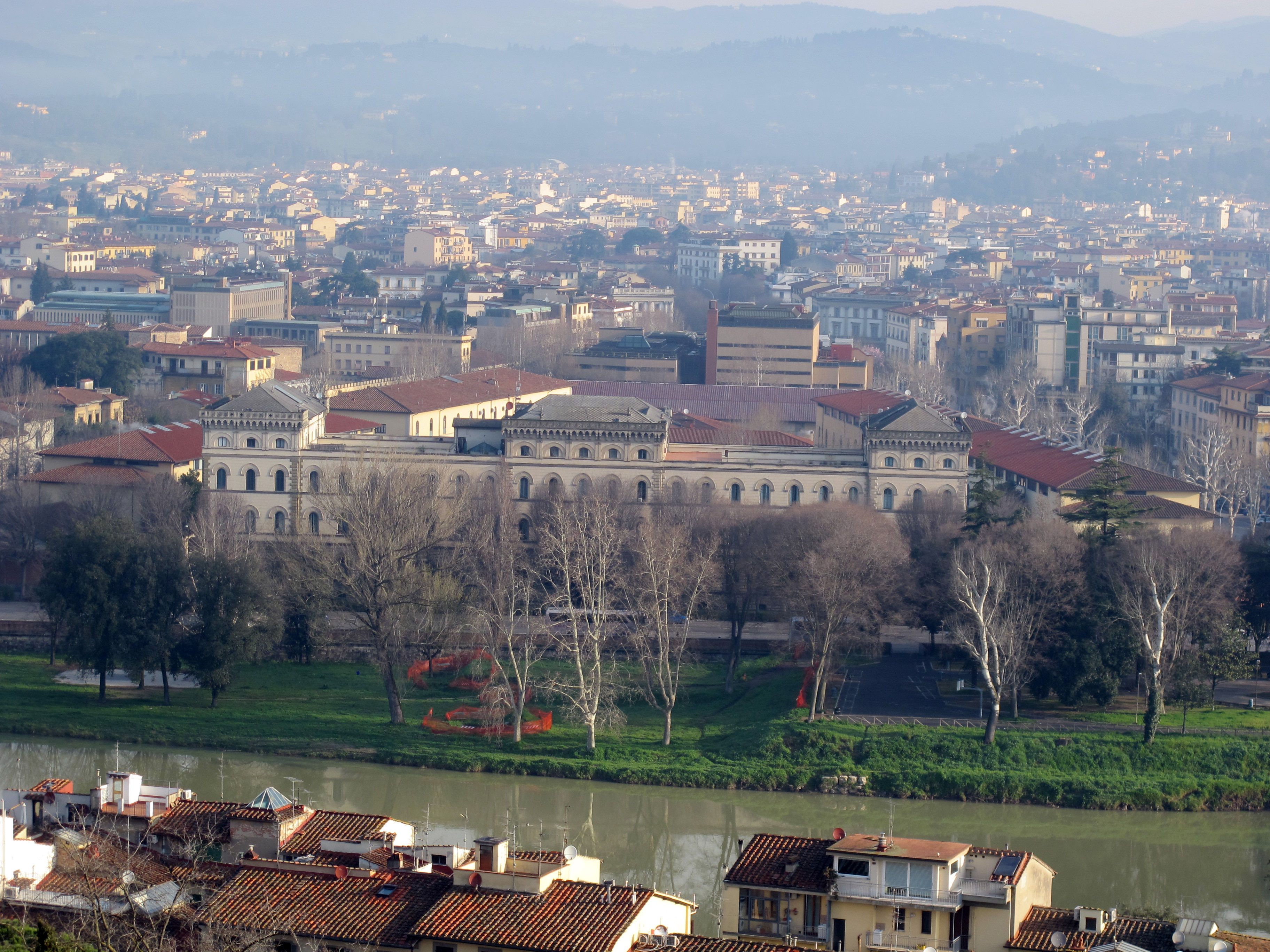 Villa la vedetta, vista 23 caserma baldissera